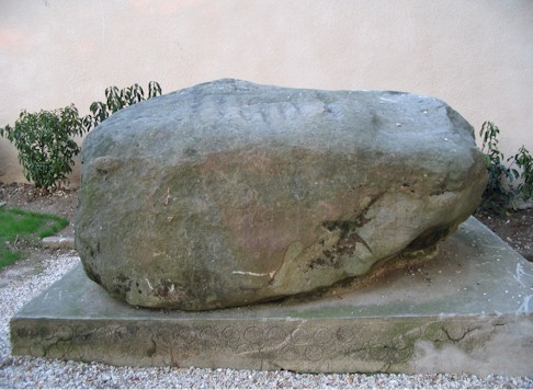 Vue du polissoir néolithique de Créteil (Val-de-Marne) Source : photo personnelle (Clio64). Catégorie:Créteil